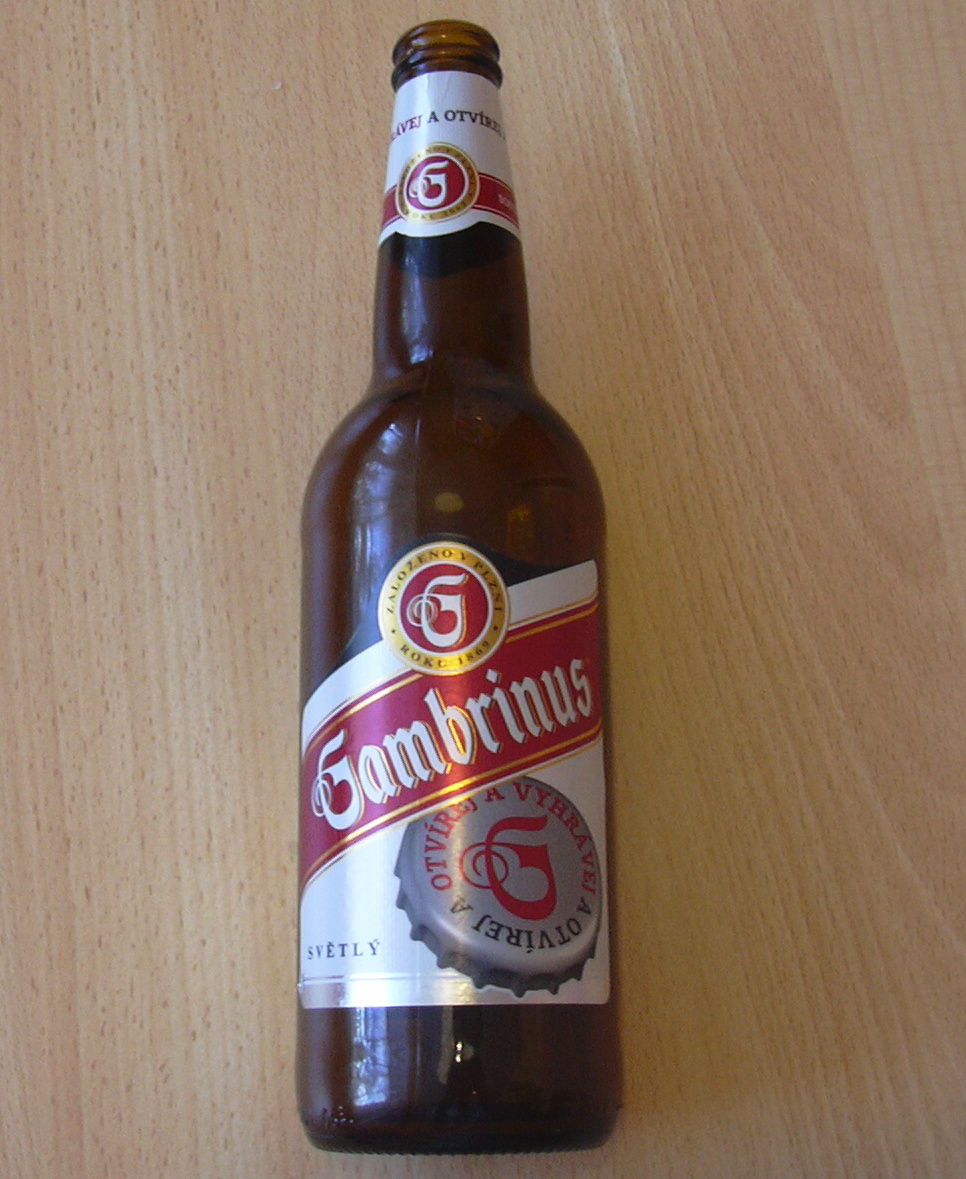 Gambrinus (Beer- czech republic)